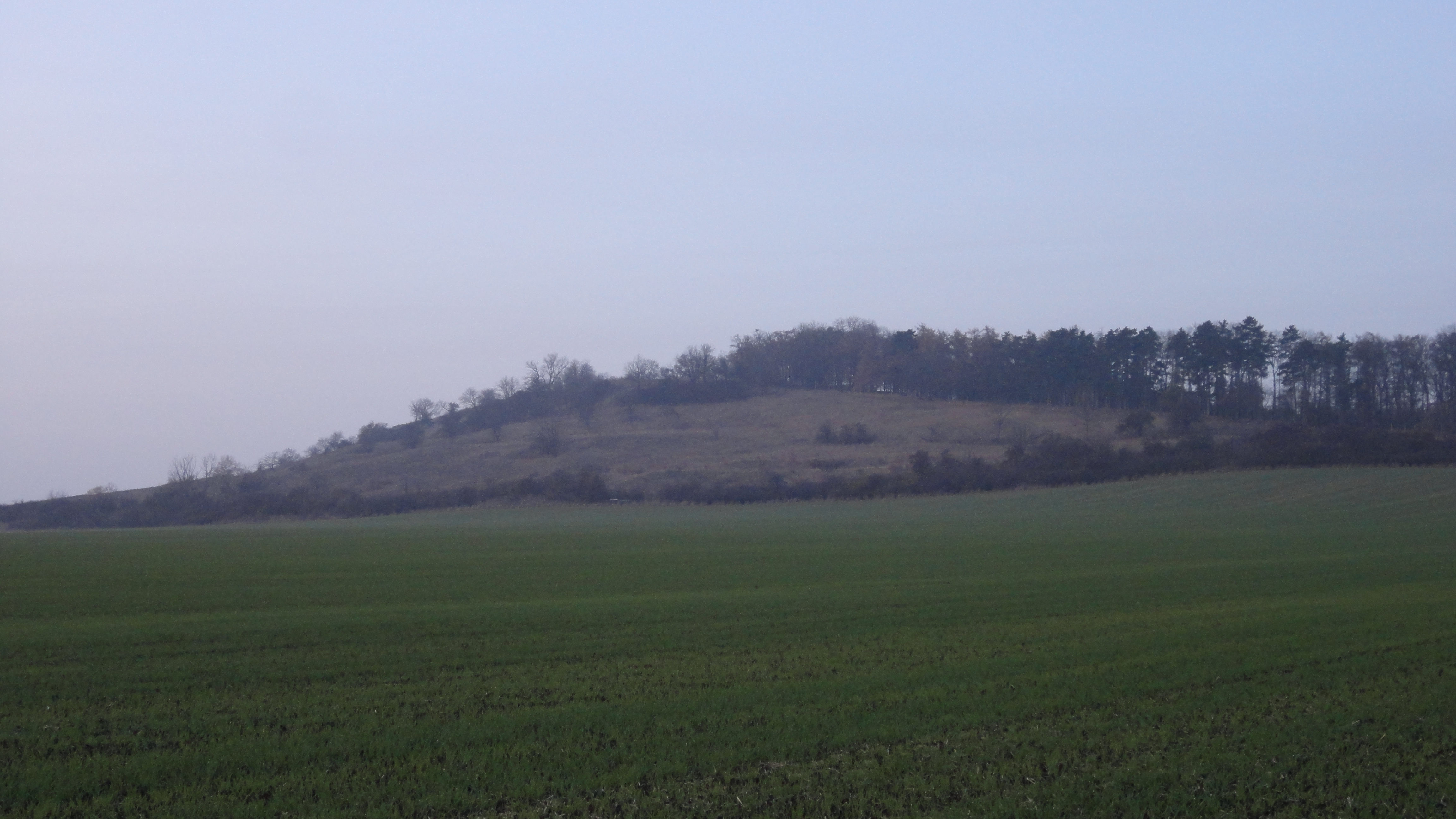 Oškobrh